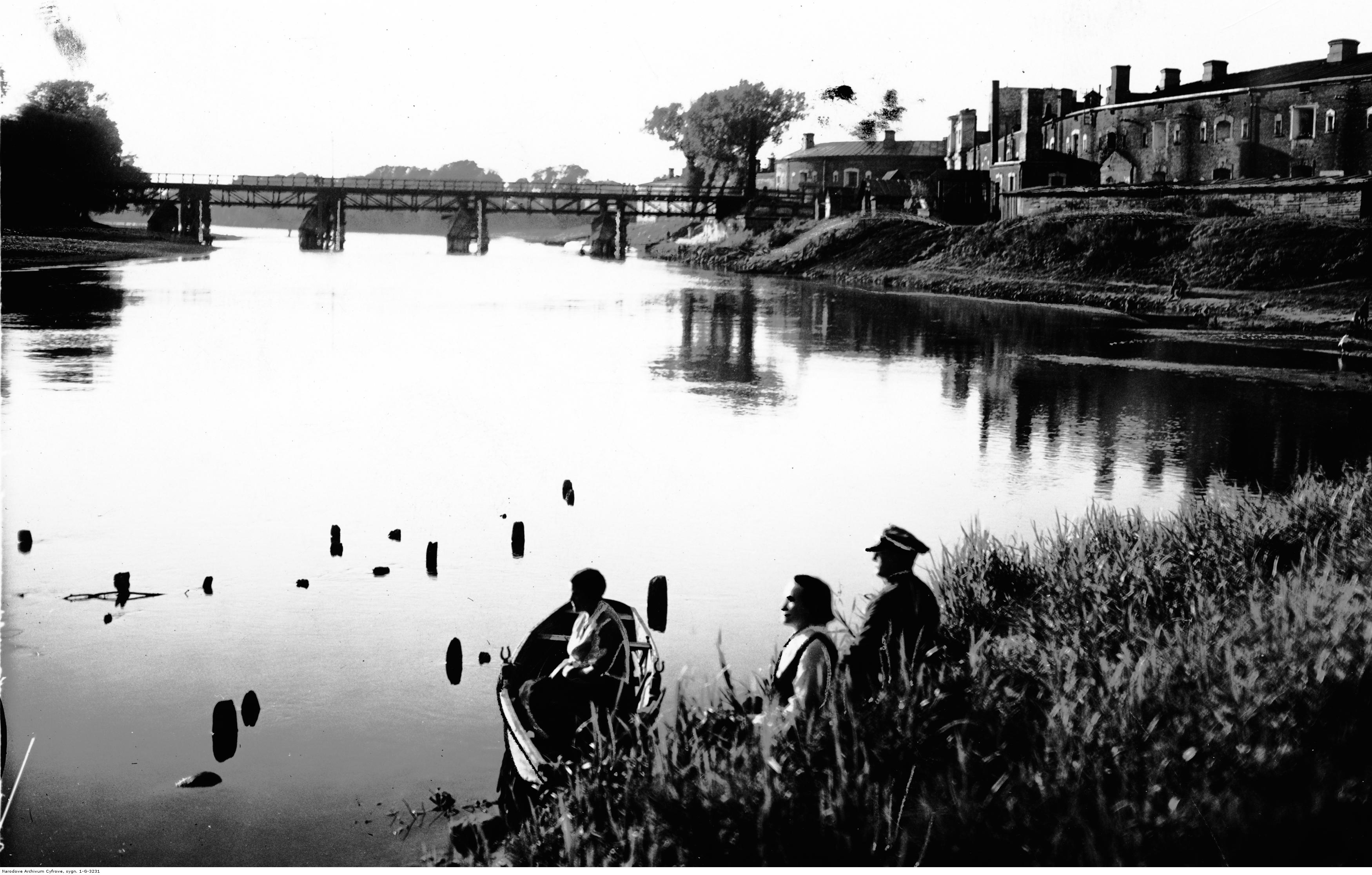 Most na Bugu w obrębie twierdzy w Brześciu - widok ogólny; 1930 r. Koncern Ilustrowany Kurier Codzienny - Archiwum Ilustracji. Sygnatura: 1-G-3231